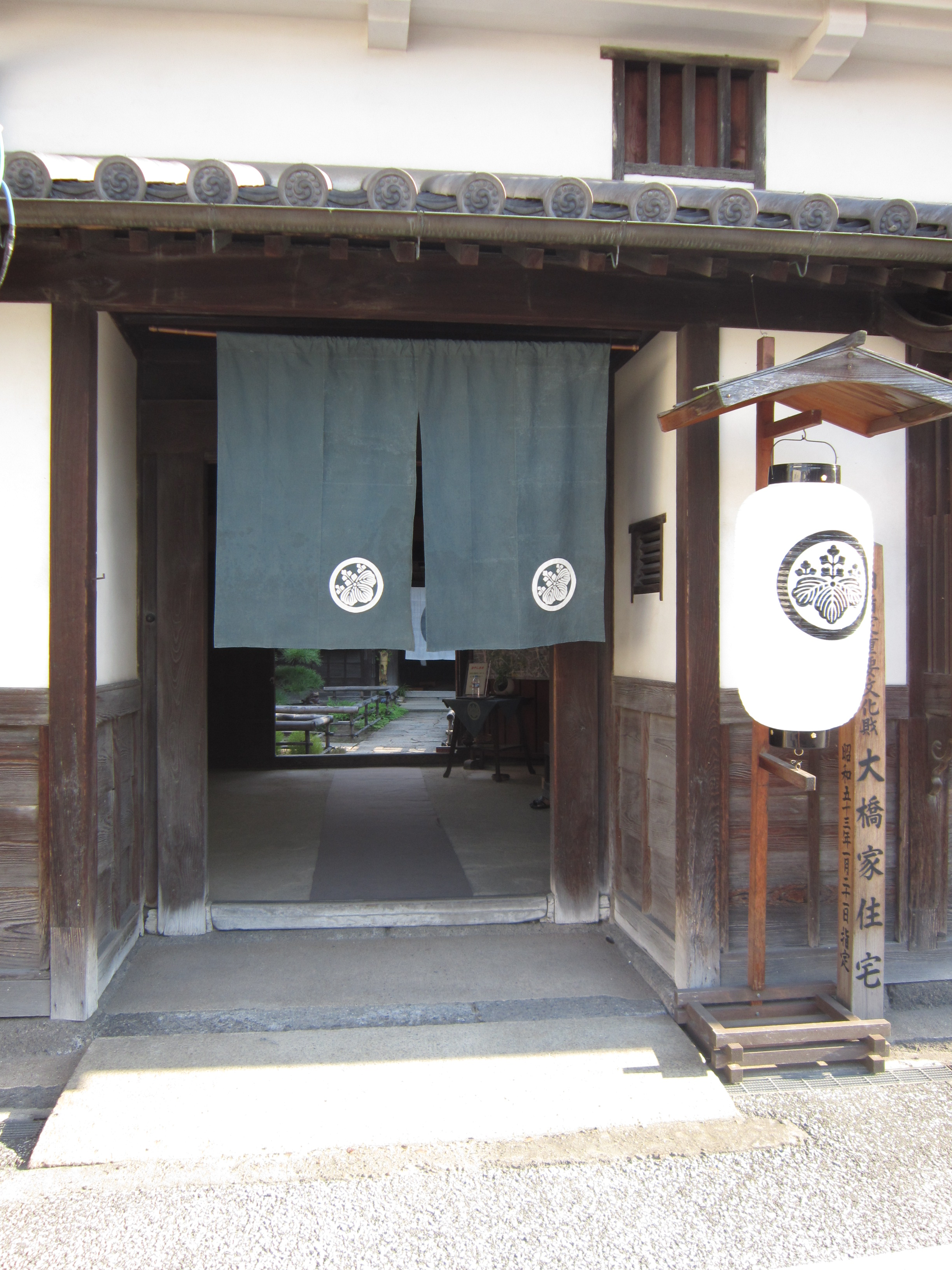 中文（台灣）: 大橋家住宅正門